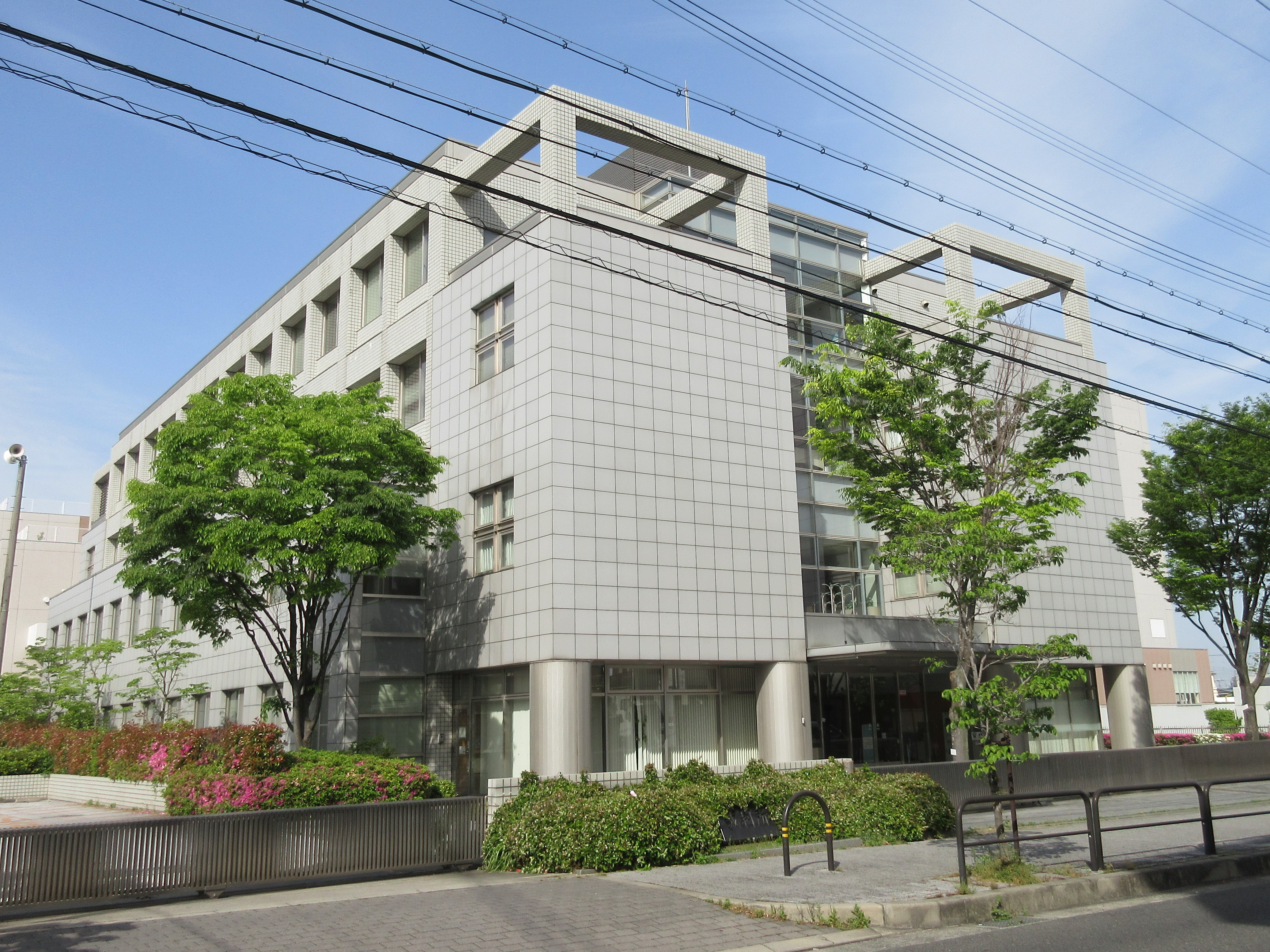 岸和田簡易裁判所